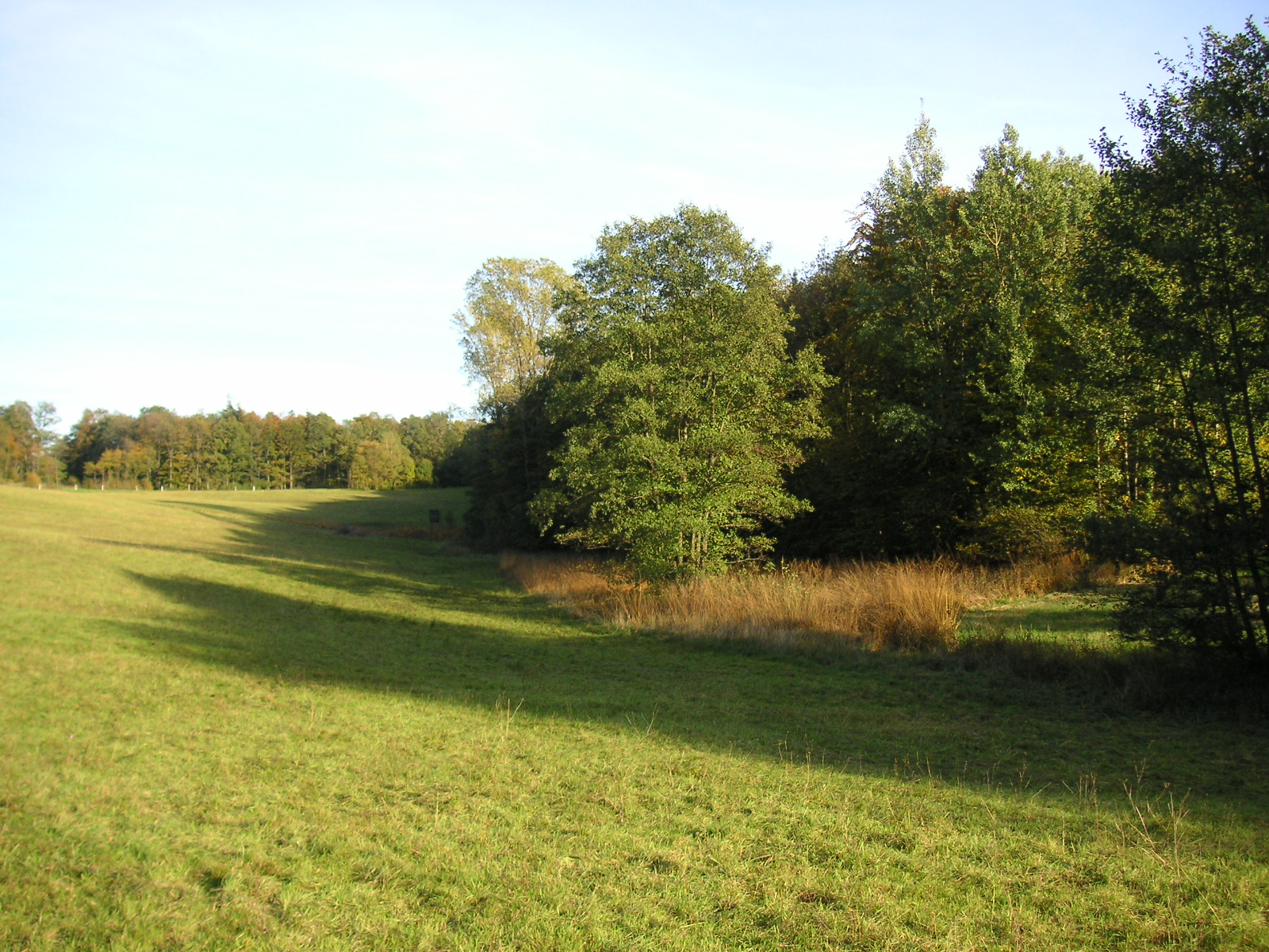 Naturschutzgebiet Enzwiese nahe Löwenstein, wo die Lauter entspringt